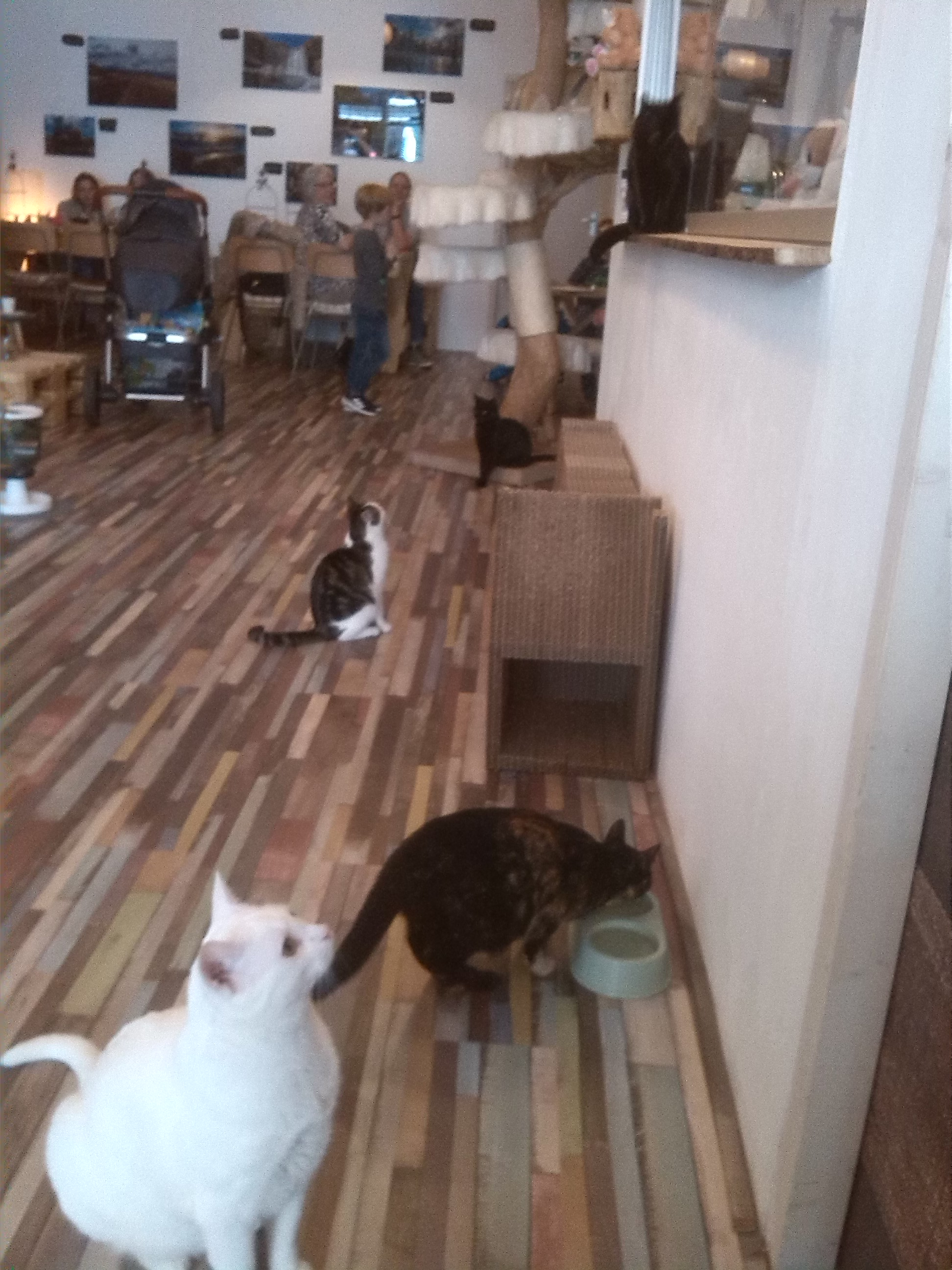 cat café Rotterdam